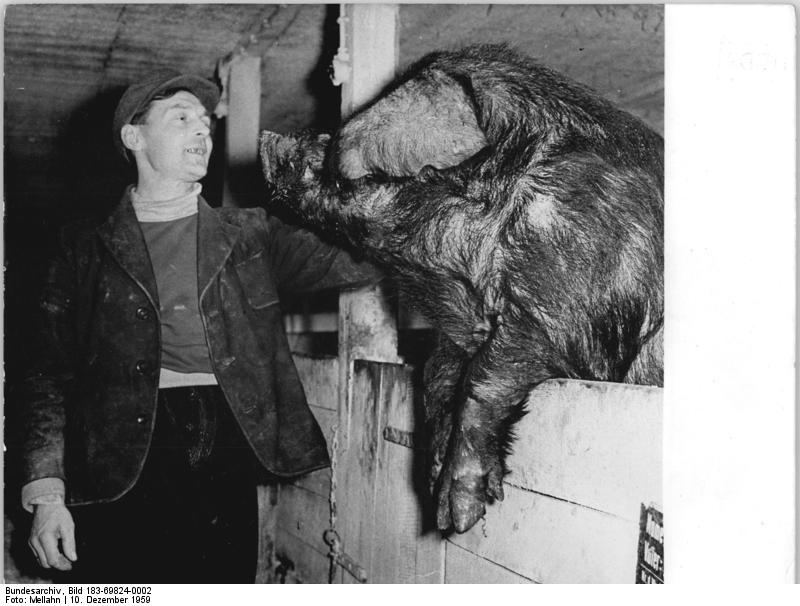 Schulenberg, Bauer mit Eber Zentralbild Mellahn 30.12.1959 Me-Wz. 4, 4 Kilogramm Getreideeinheiten für 1 Kilogramm Schweinefleisch. Mit einem Futteraufwand von 4, 4 Kilogramm Getreide-Einheiten wird in der LPG Schulenberg im Kreise Ribnitz-Damgarten bei Schweinen 1 Kilogramm Fleischzuwachs erreicht. Dieses Ergebnis liegt beträchtlich unter dem Durchschnitt in der Republik von 6 Kilogramm Getreide-Einheiten. Die Erfolge sind auf die Anwendung wissenschaftlicher Erkenntnisse bei der Futterzubereitung, der ständigen Qualifizierung der Viehzüchter und einer vorbildlichen Pflege der Tiere zurückzuführen. UBz: Ein prächtiger Jonathan aus dem Zuchtstall des Viehzüchters Herbert Maahs in der LPG Schulenberg.